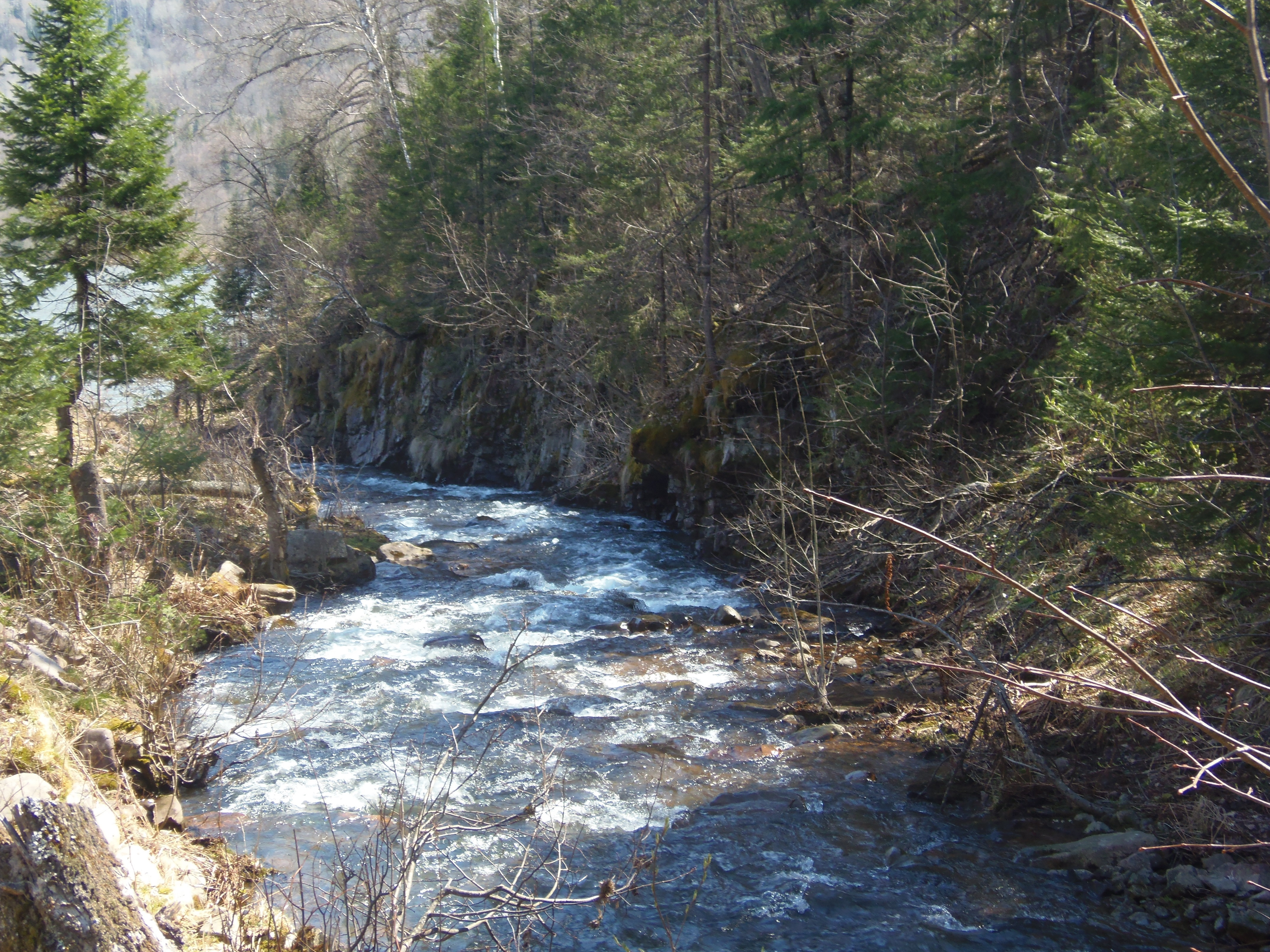 Йөйәк йылғаһы. Белорет районы